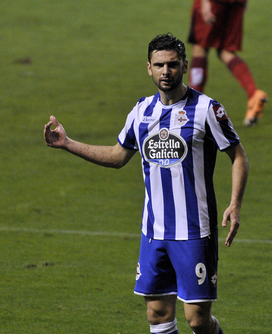 Hélder Postiga playing for Deportivo la Coruna